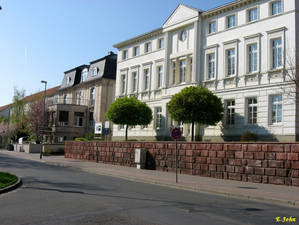 Nordhausen am Harz, Wallrothstraße, IHK-Thüringen